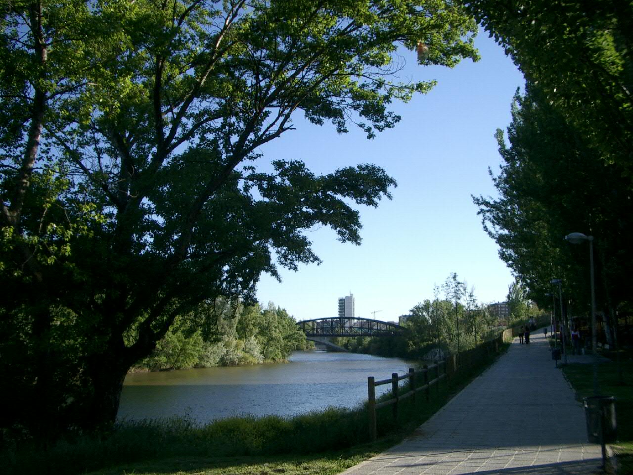 Vista panorámica del río Pisuerga entre los puentes Colgante y García Morato tomada desde su margen derecha.